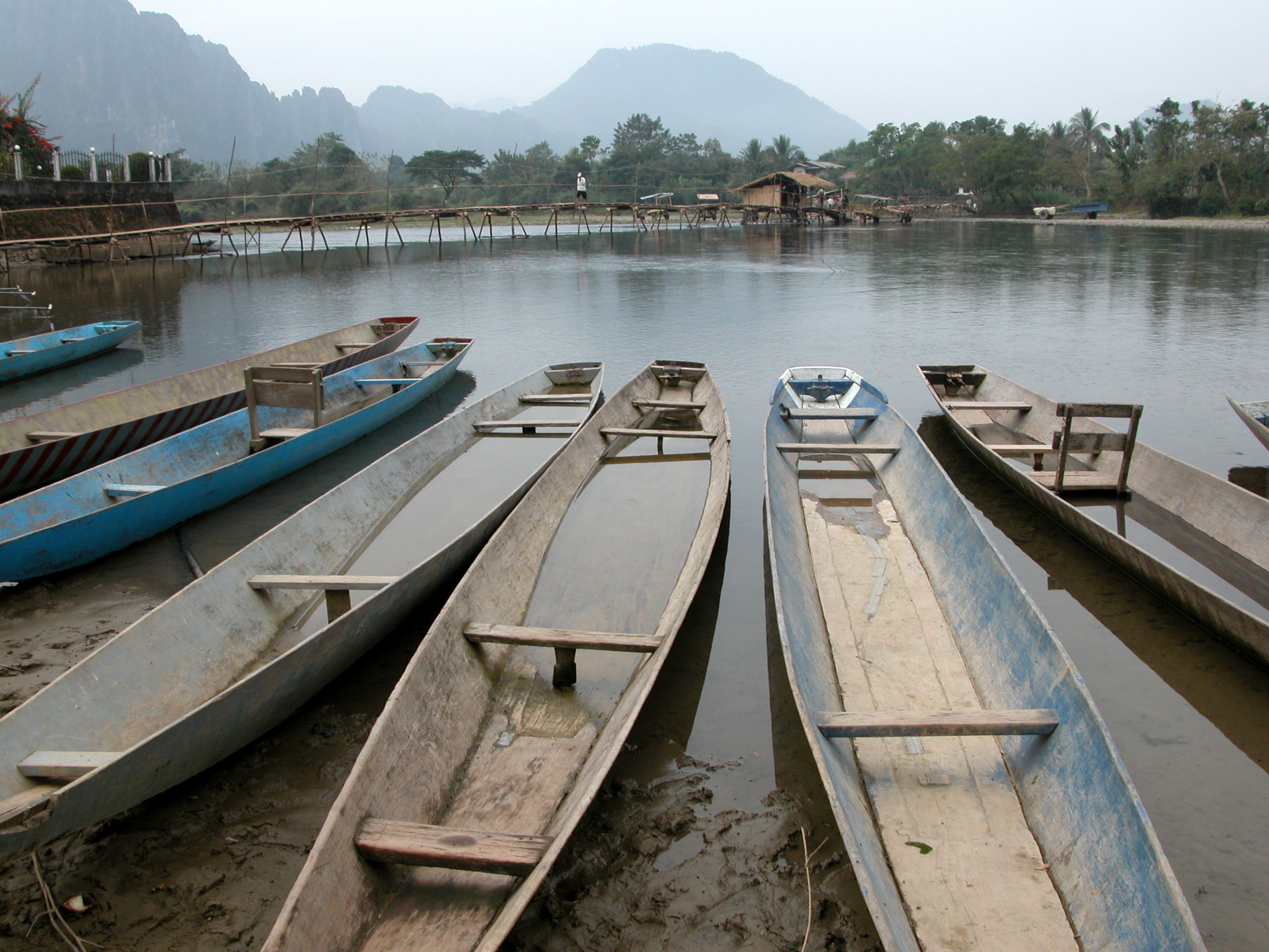 Laos Vang Vien le petit pont pendant les basses eaux